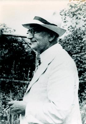 Foto di Tommy Bonnesen